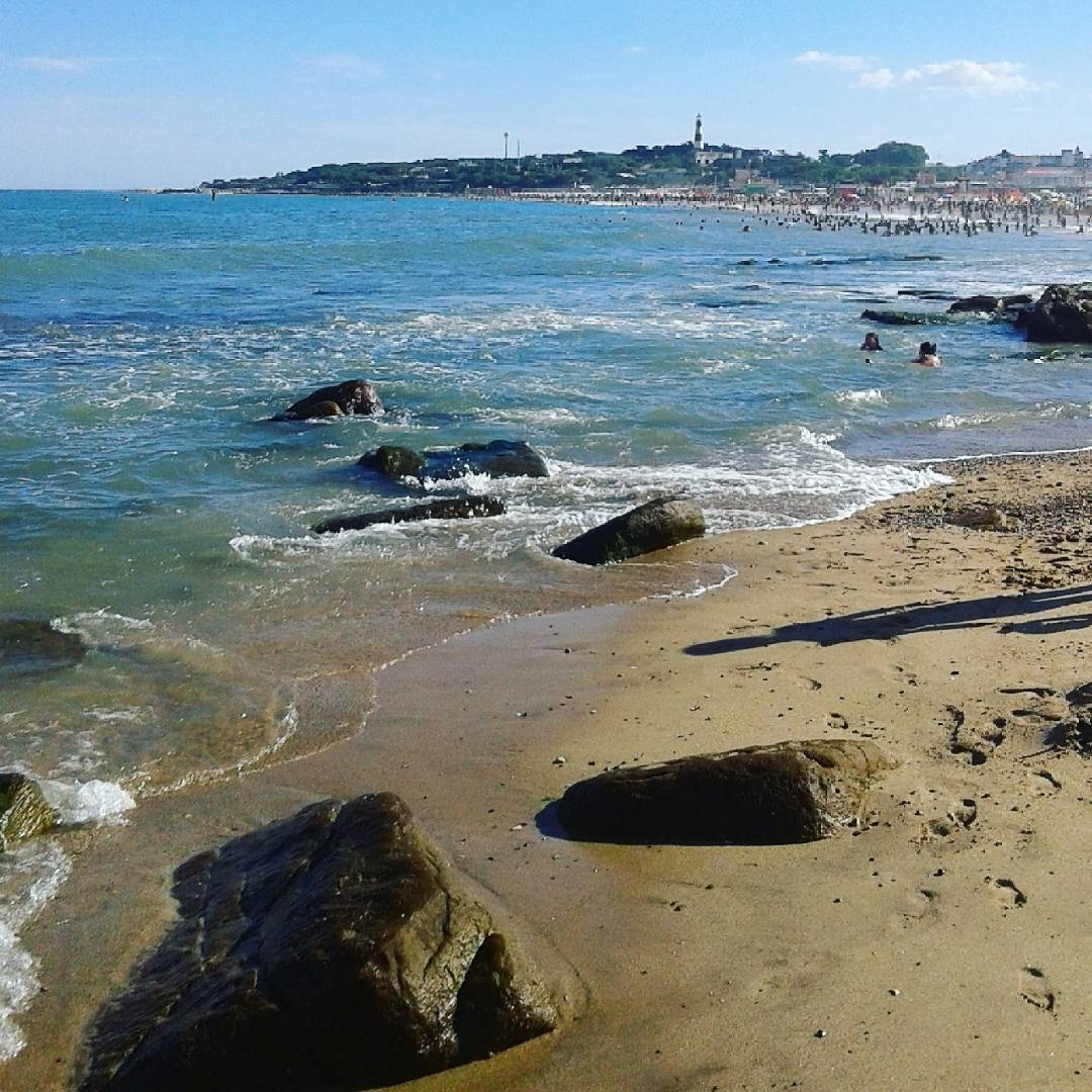 Bahia del Faro, al sur de Waikiki.